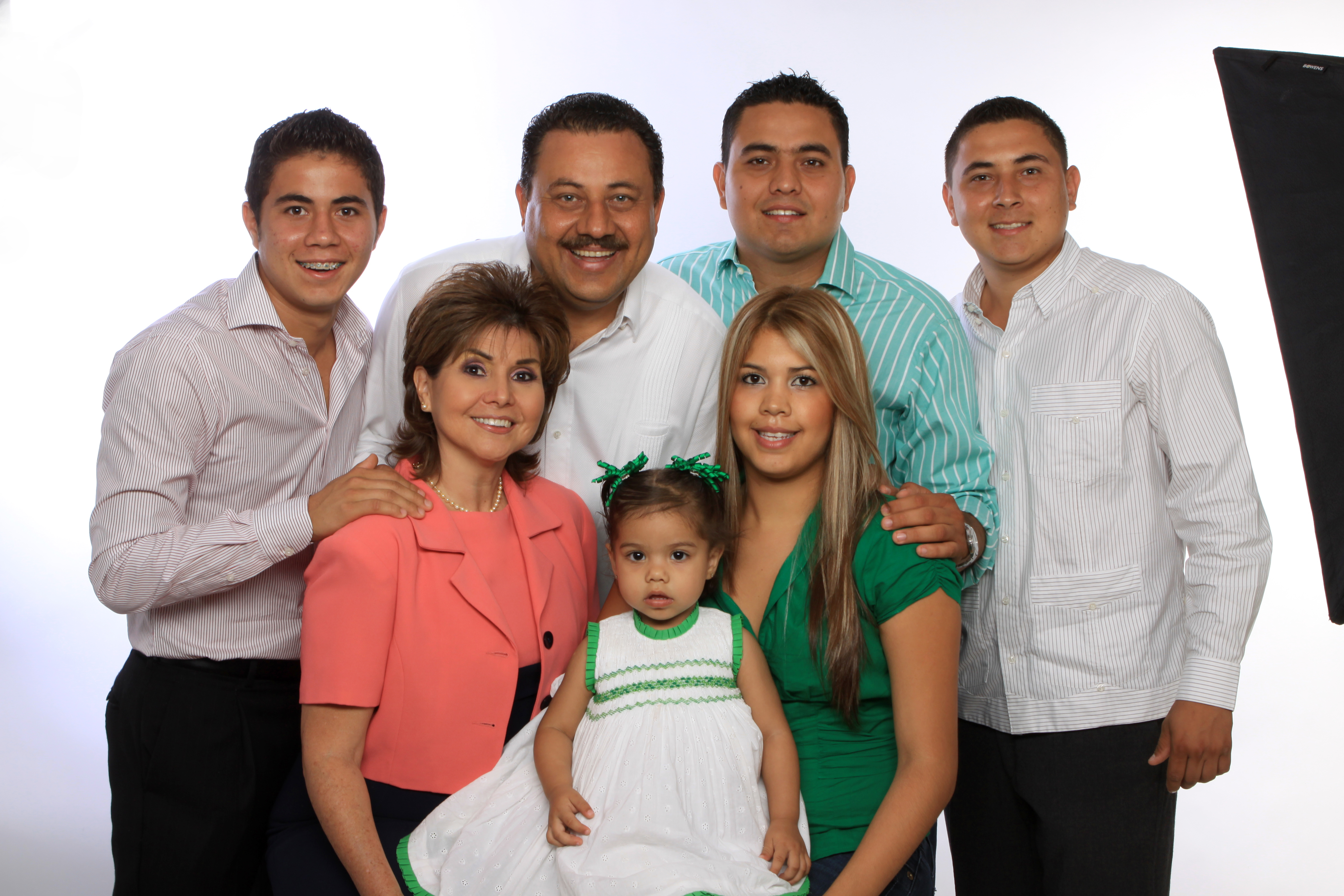 Con mi familia